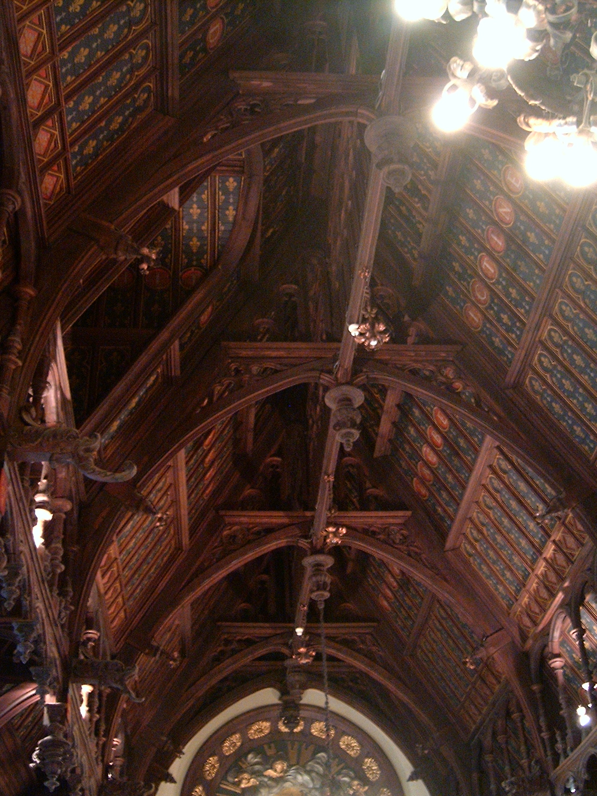 Détail d'un des plafonds du Palais Bénédictine.